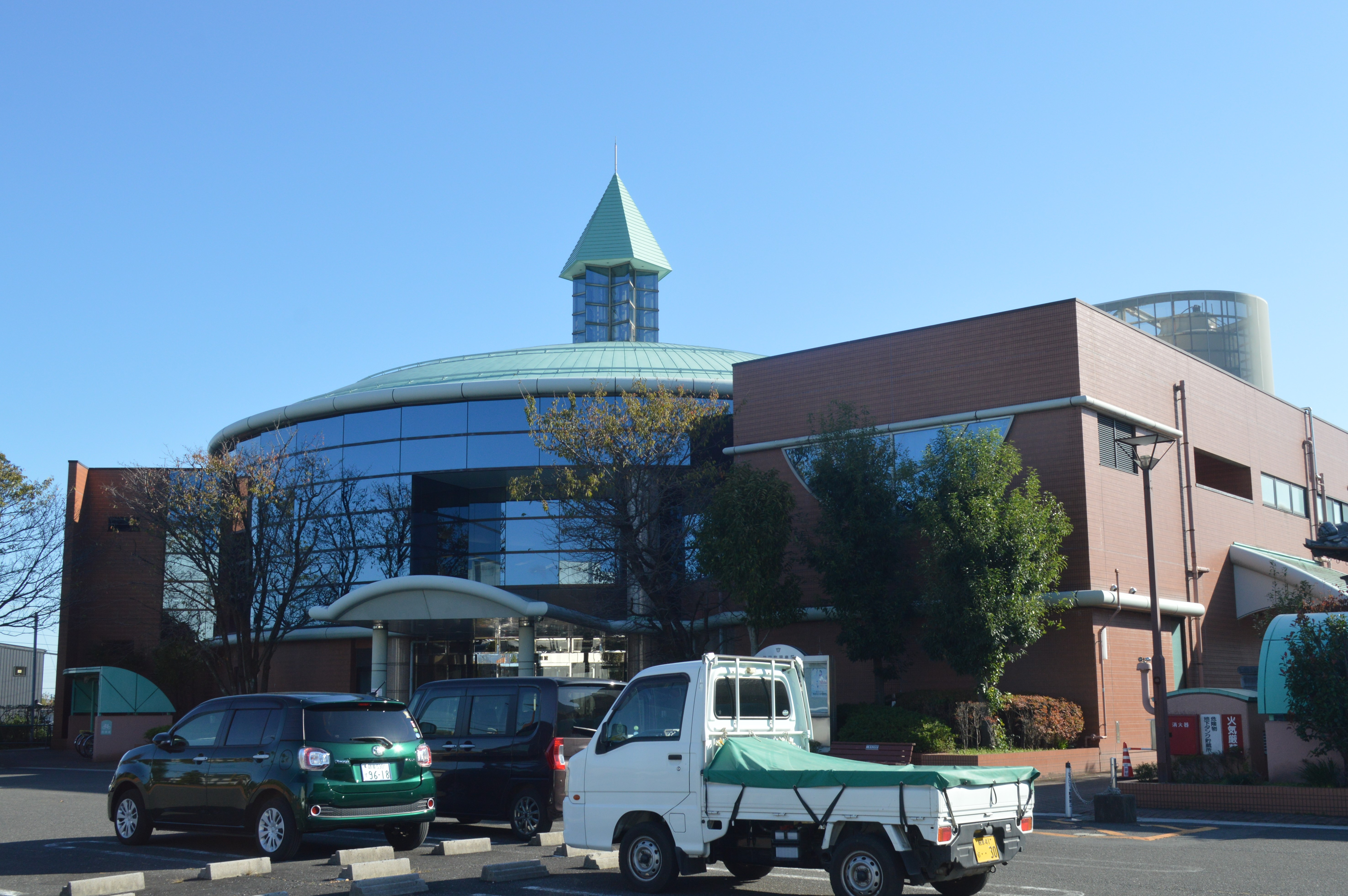 岐阜県揖斐郡池田町にある池田町図書館。